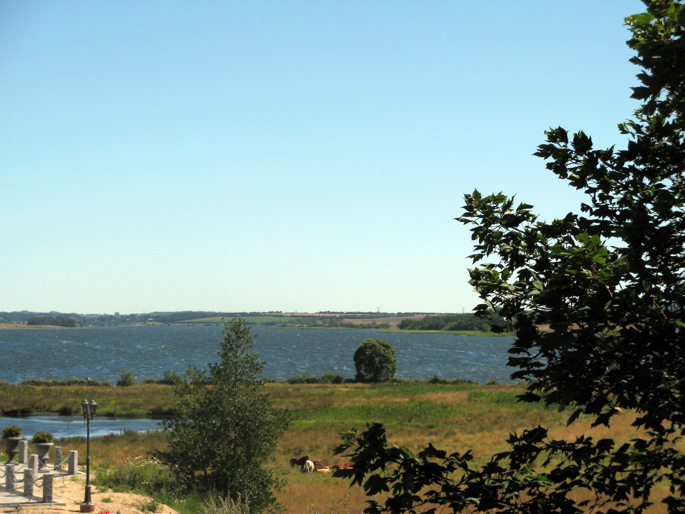 Søen set fra vest